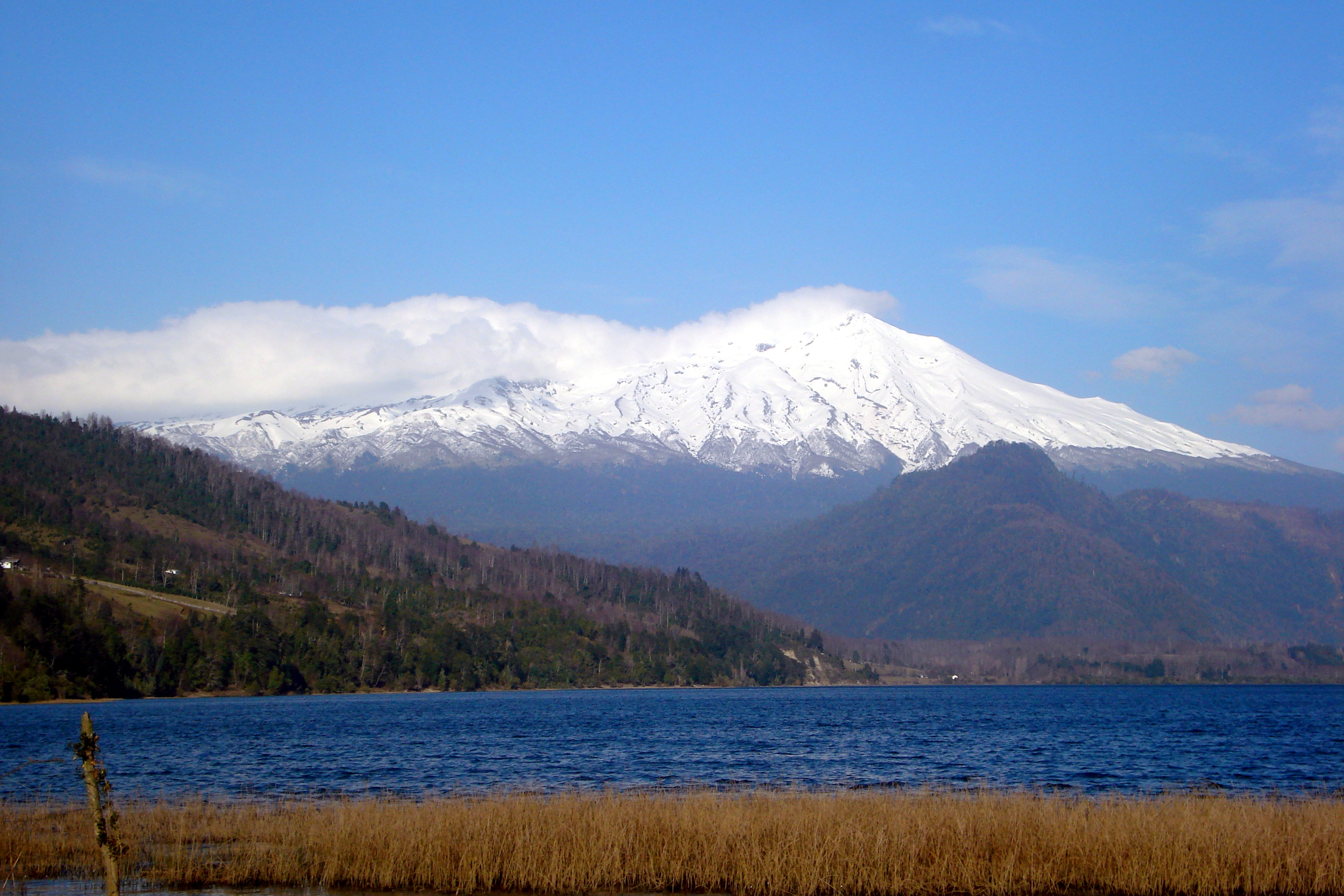 Paisaje del lago Neltume. Al fondo se ve el volcánChoshuenco, mientras que el Mocho está oculto por una nube.